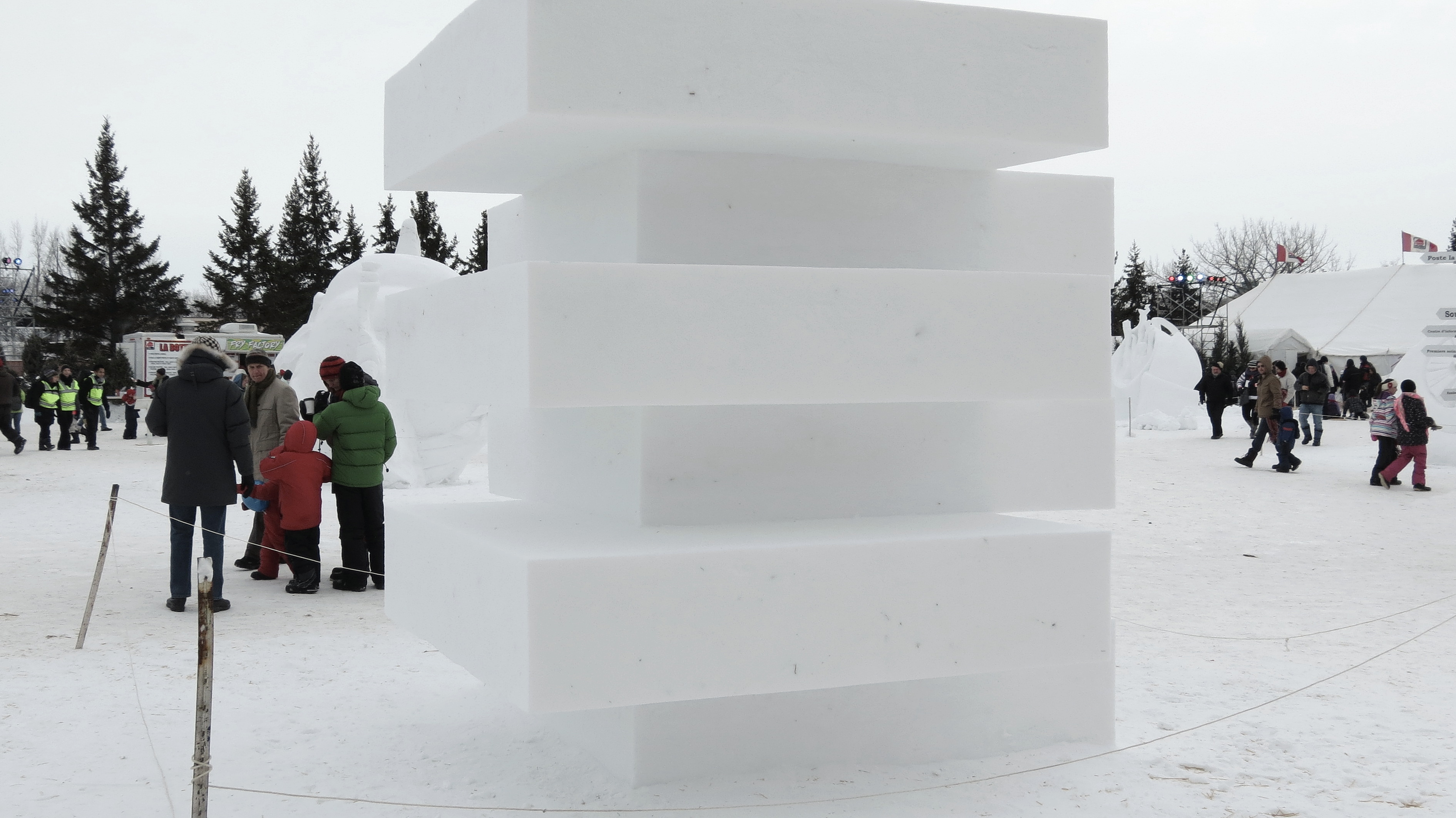 Festival du Voyageur. Whittier Park, St. Boniface, Winnipeg, Manitoba, Canada